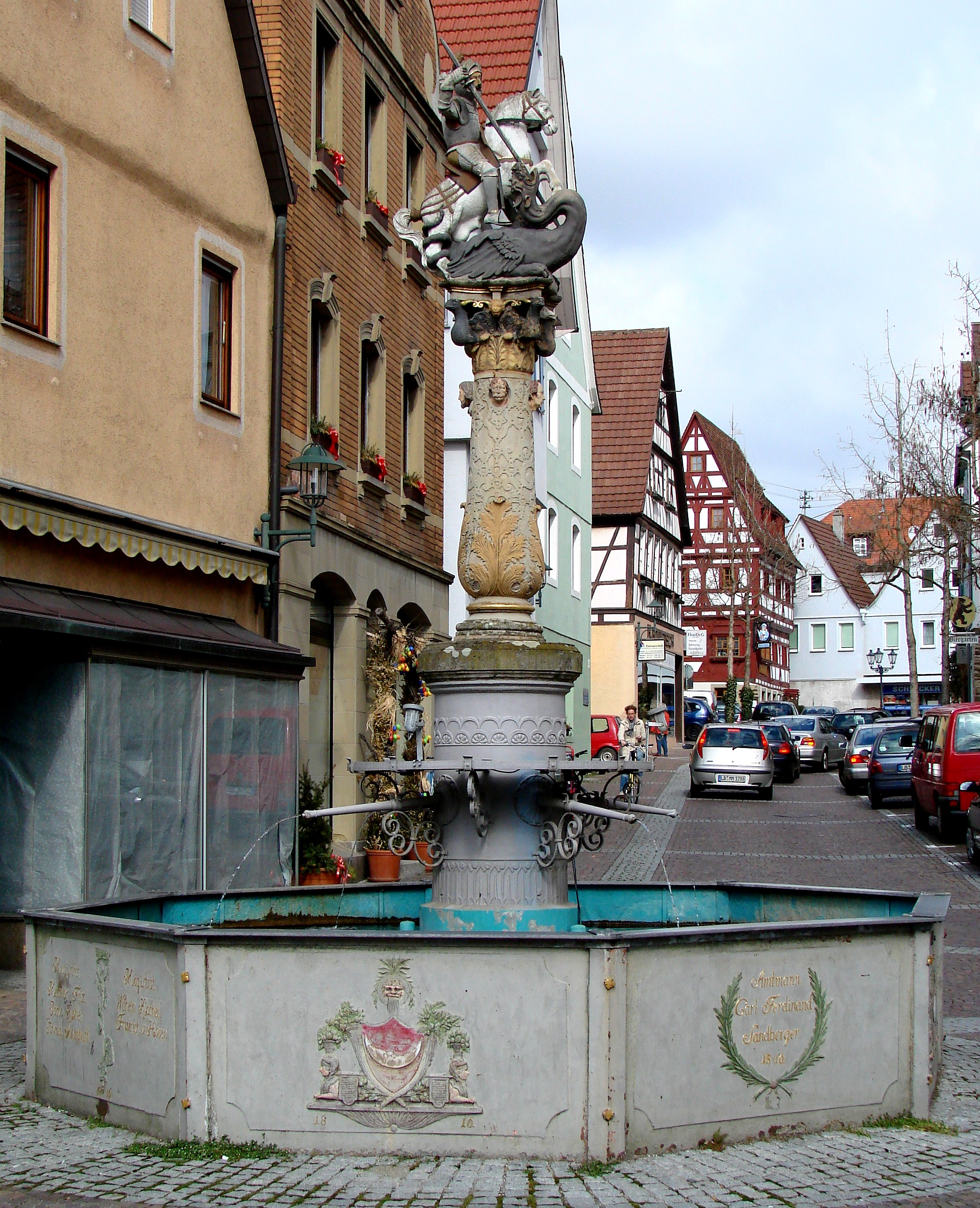 Bönnigheim, St. George's font